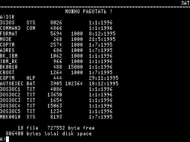 Скриншот операционной системы DX-DOS в эмуляторе БК